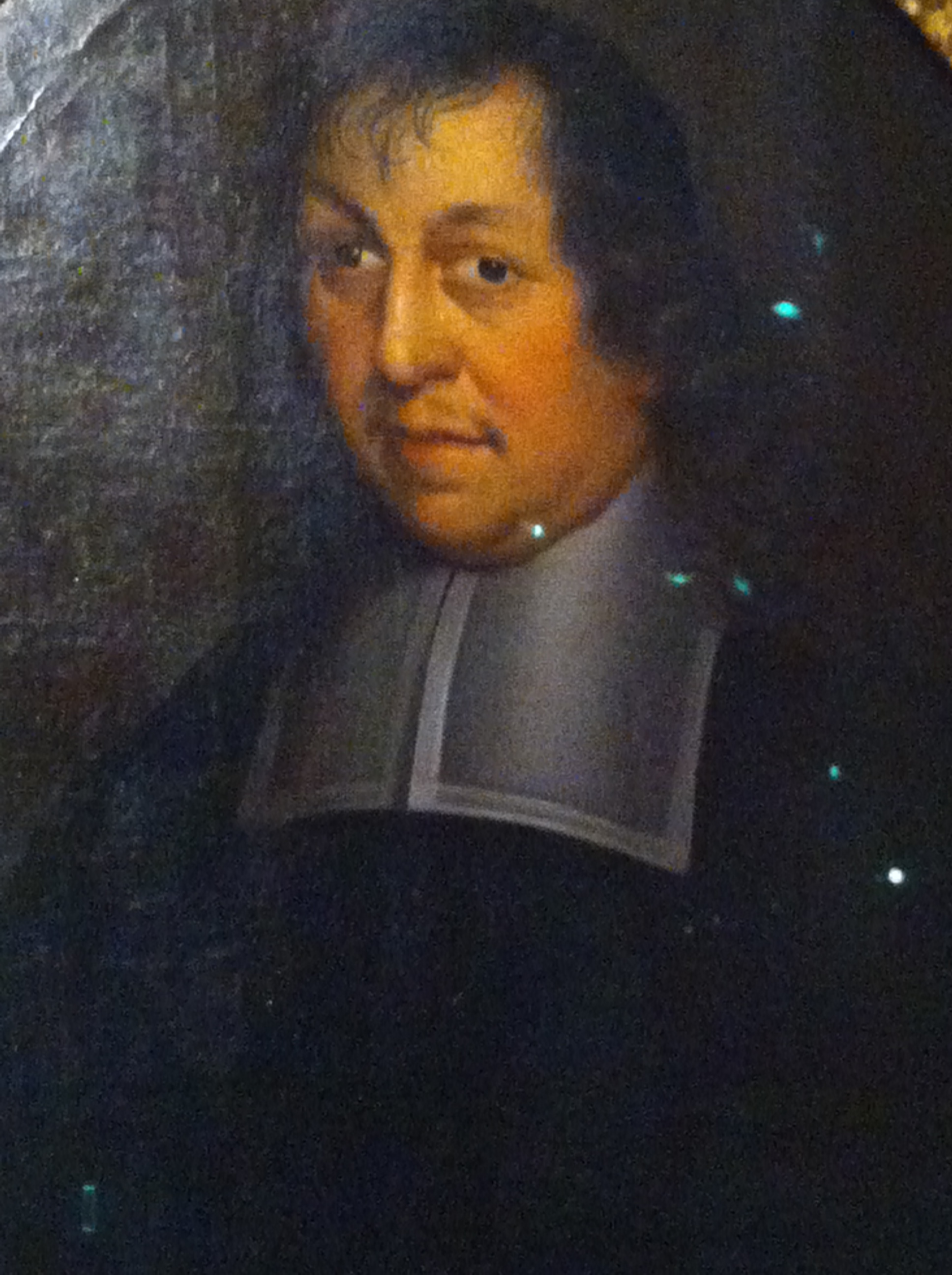 Jean Claude (1619-1687), pasteur et chef protestant